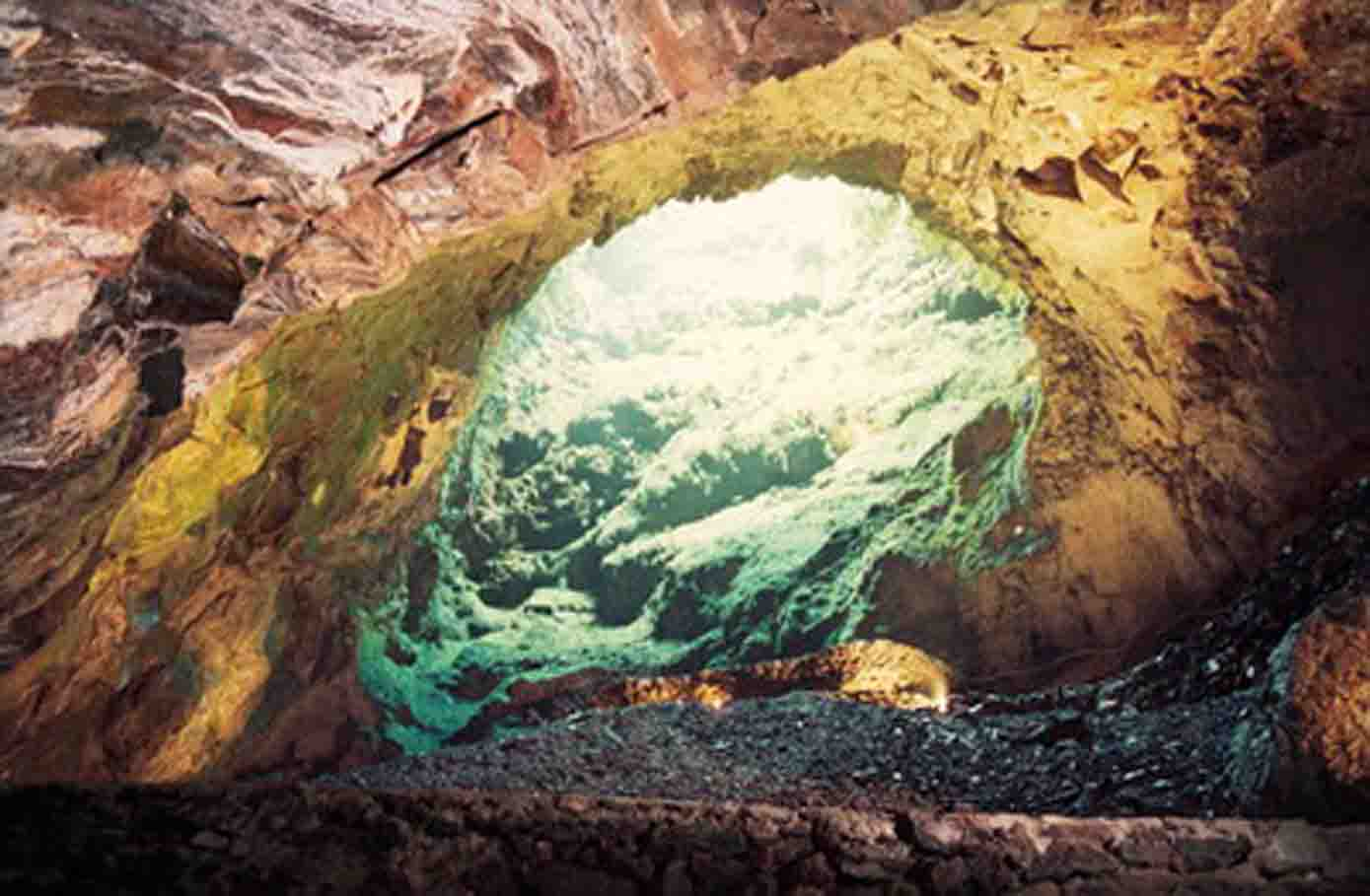 Algar do Carvão, Ilha Terceira, Açores - Portugal.